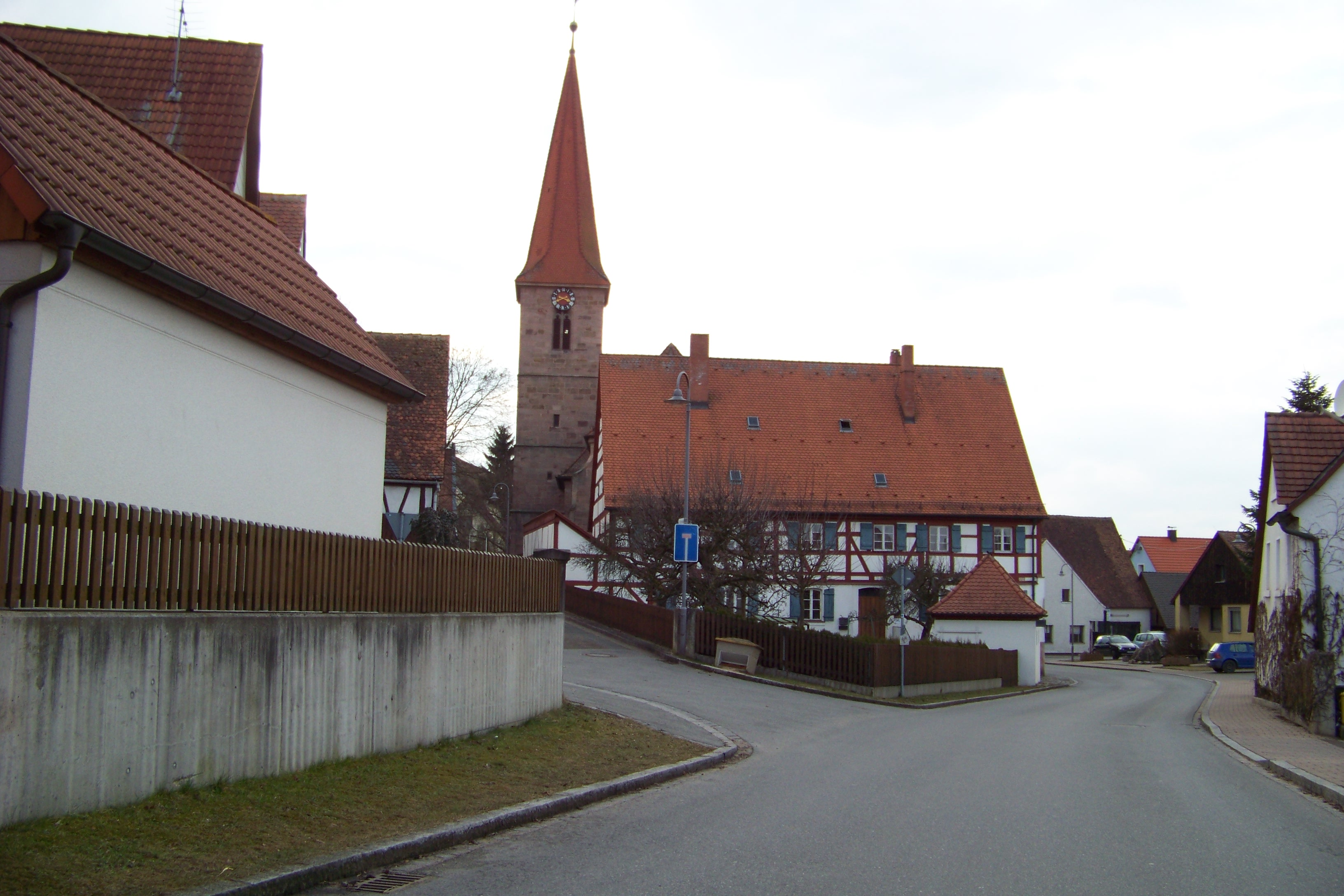 Häuser in Rohr